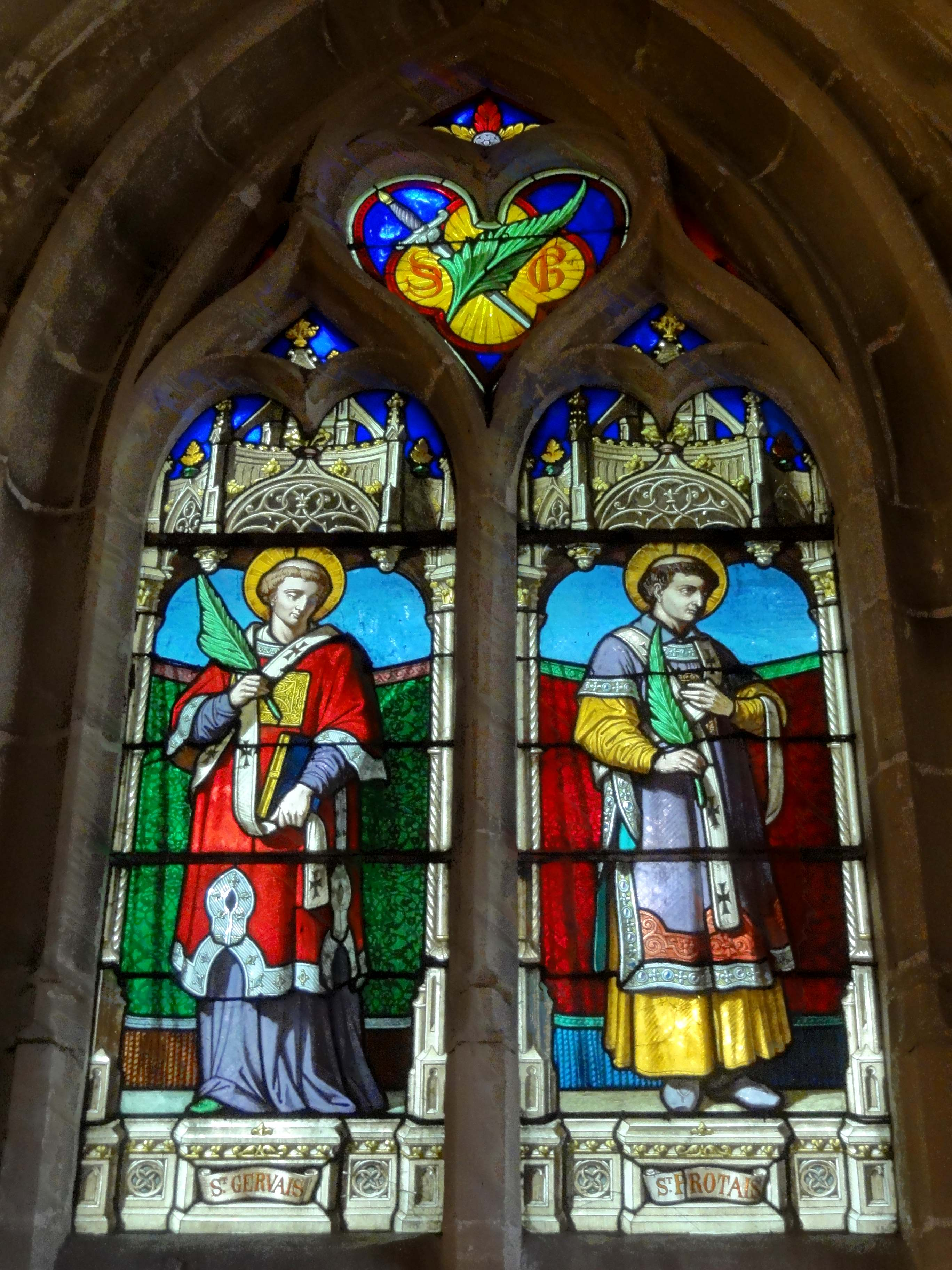 Vitrail de l'église (voir titre).